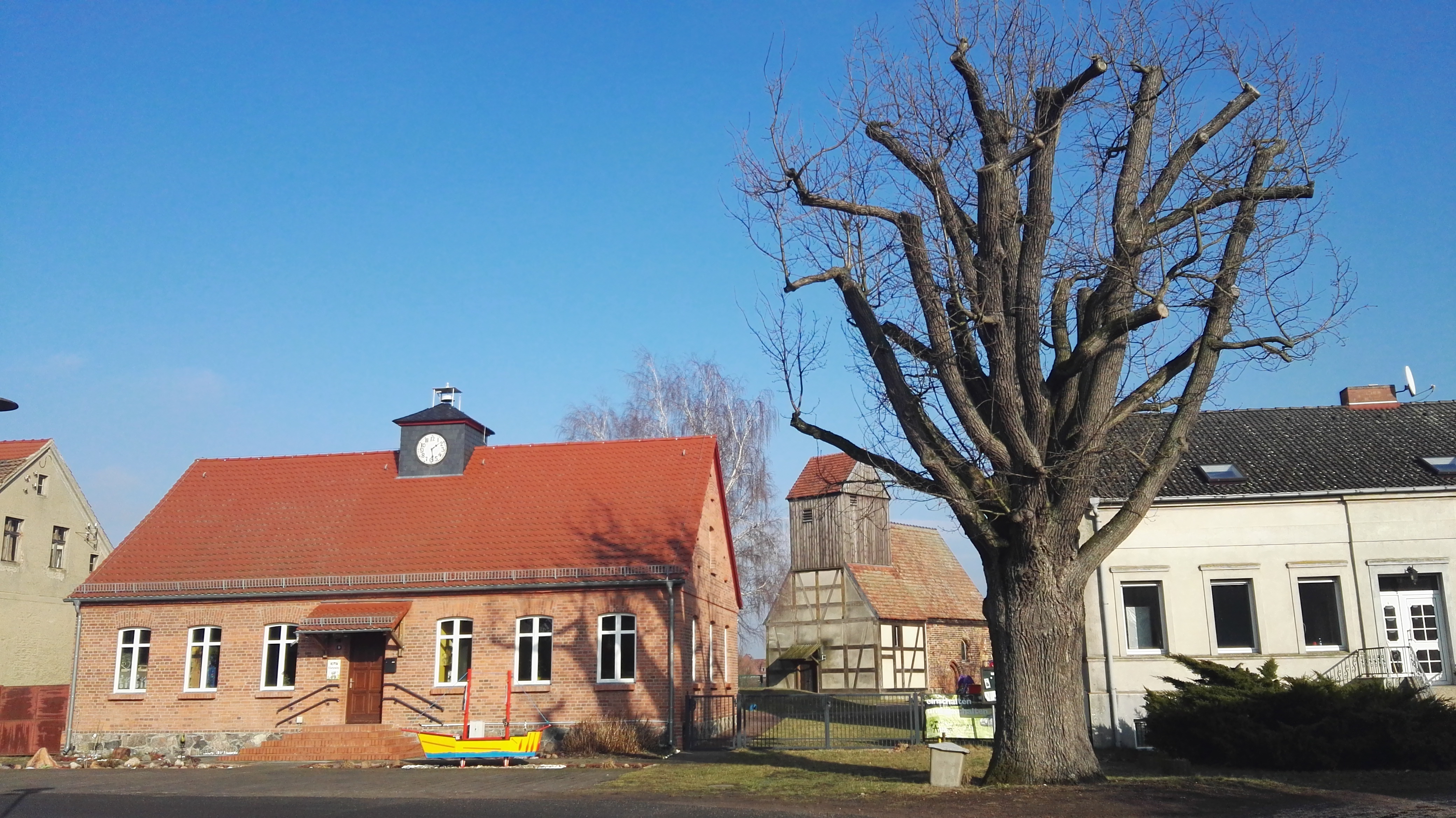 denkmalgeschützte Kirche Vietznitz und Vietznitzer Dorfeiche (Naturdenkmal)